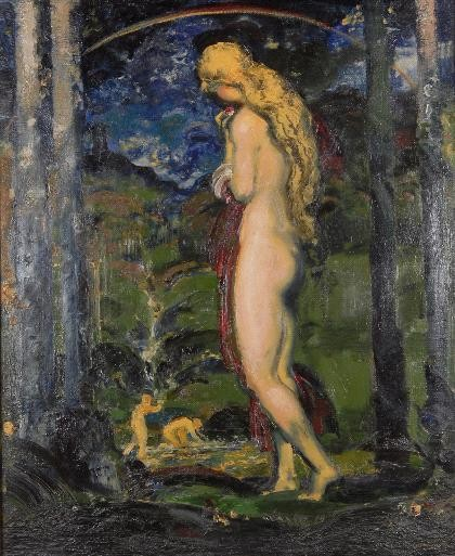 Abend